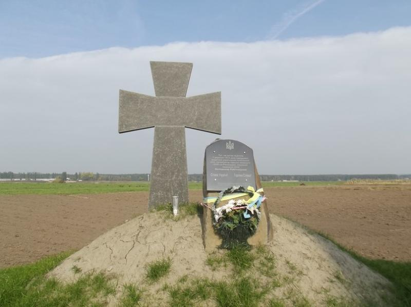 Памятний знак Качинському Сергію, організатору перших відділів УПА. (Оржів)